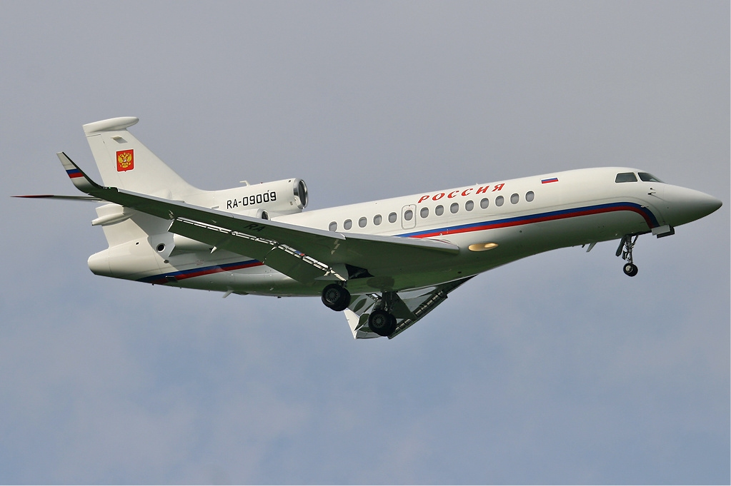 Rossiya Dassault Falcon 7X